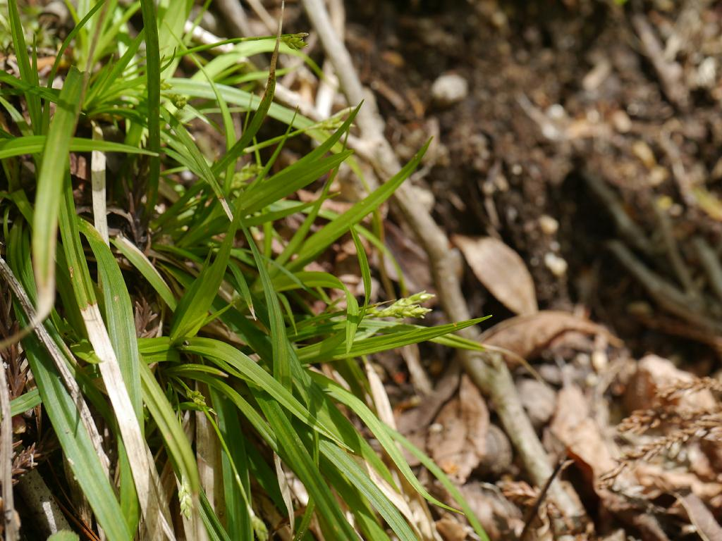 Carex hashimotoi：サヤマスゲ 2018/05/04 滋賀県：Siga Pref. Japan